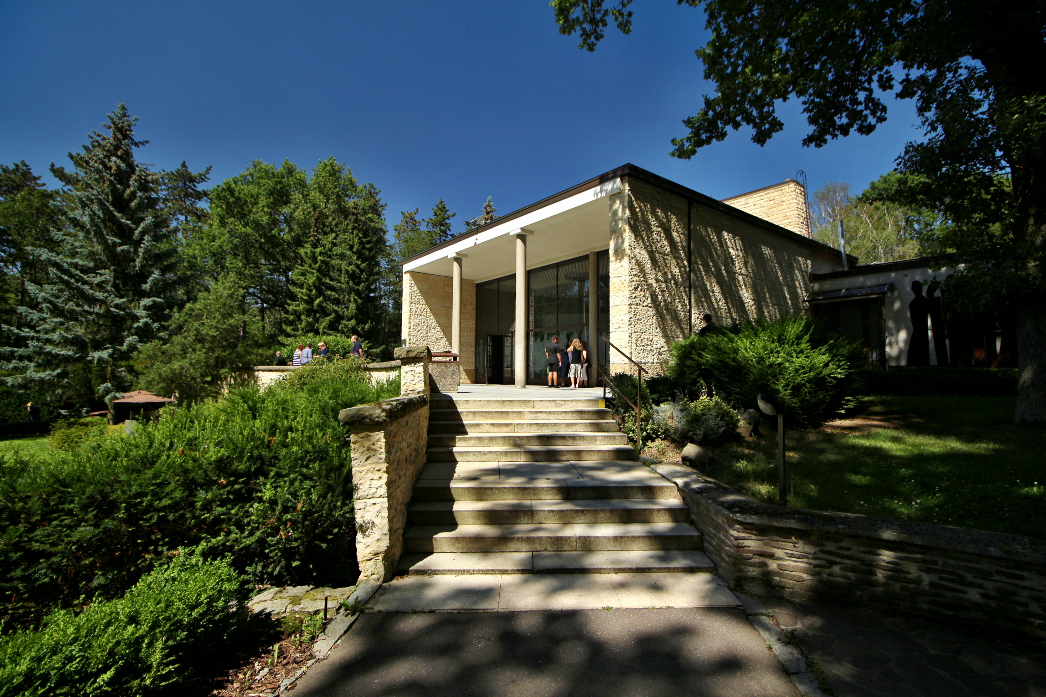 Hřbitov Praha-Motol